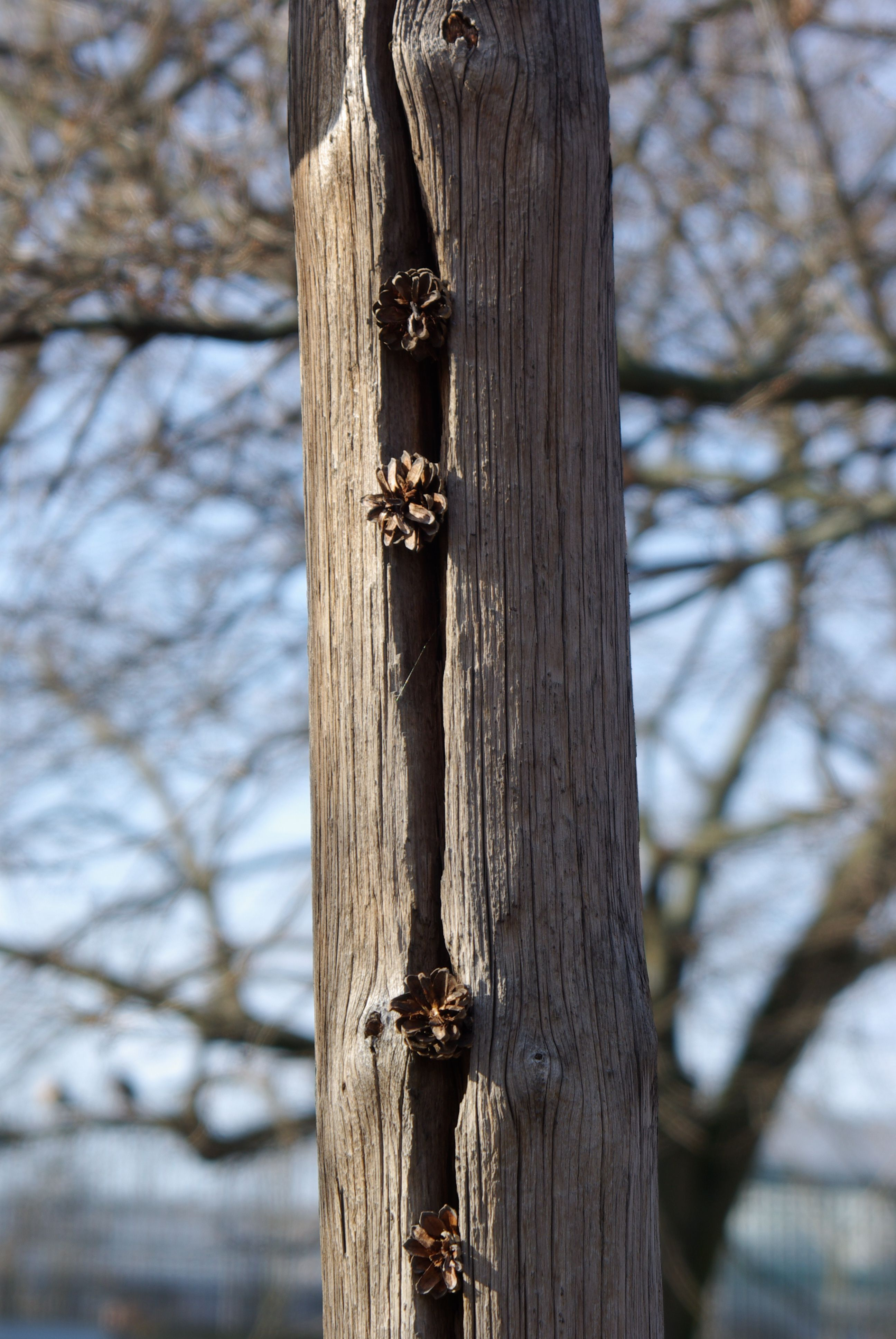 Berlin, Berliner Zoo. Detail einer Spechtschmiede. Das ist ein Strommast aus Holz, in dem ein Specht Zapfen gedrückt hat. Der Baums steht im Berliner Zoo am Streichelzoo.